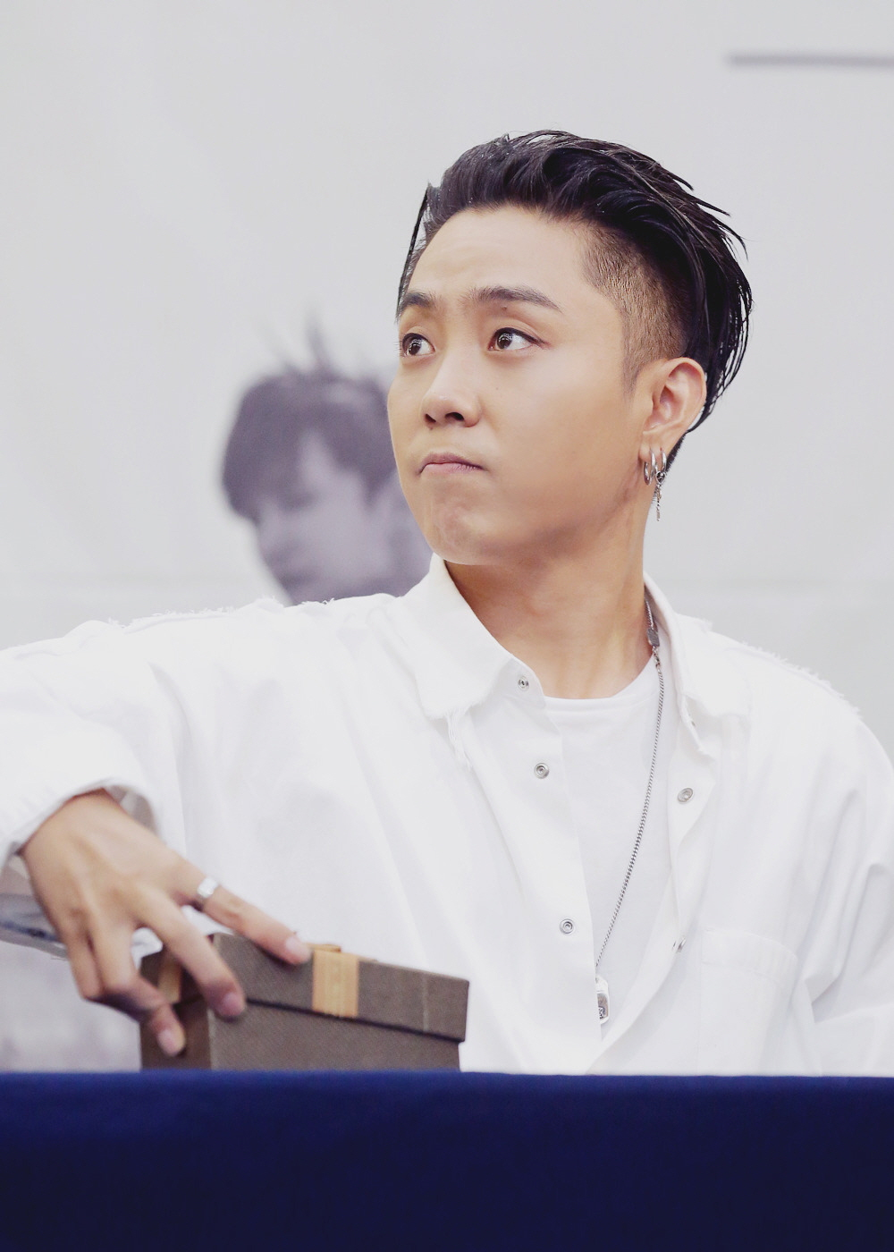 170504 젝스키스 팬사인회 은지원 이재진 김재덕 강성훈 장수원